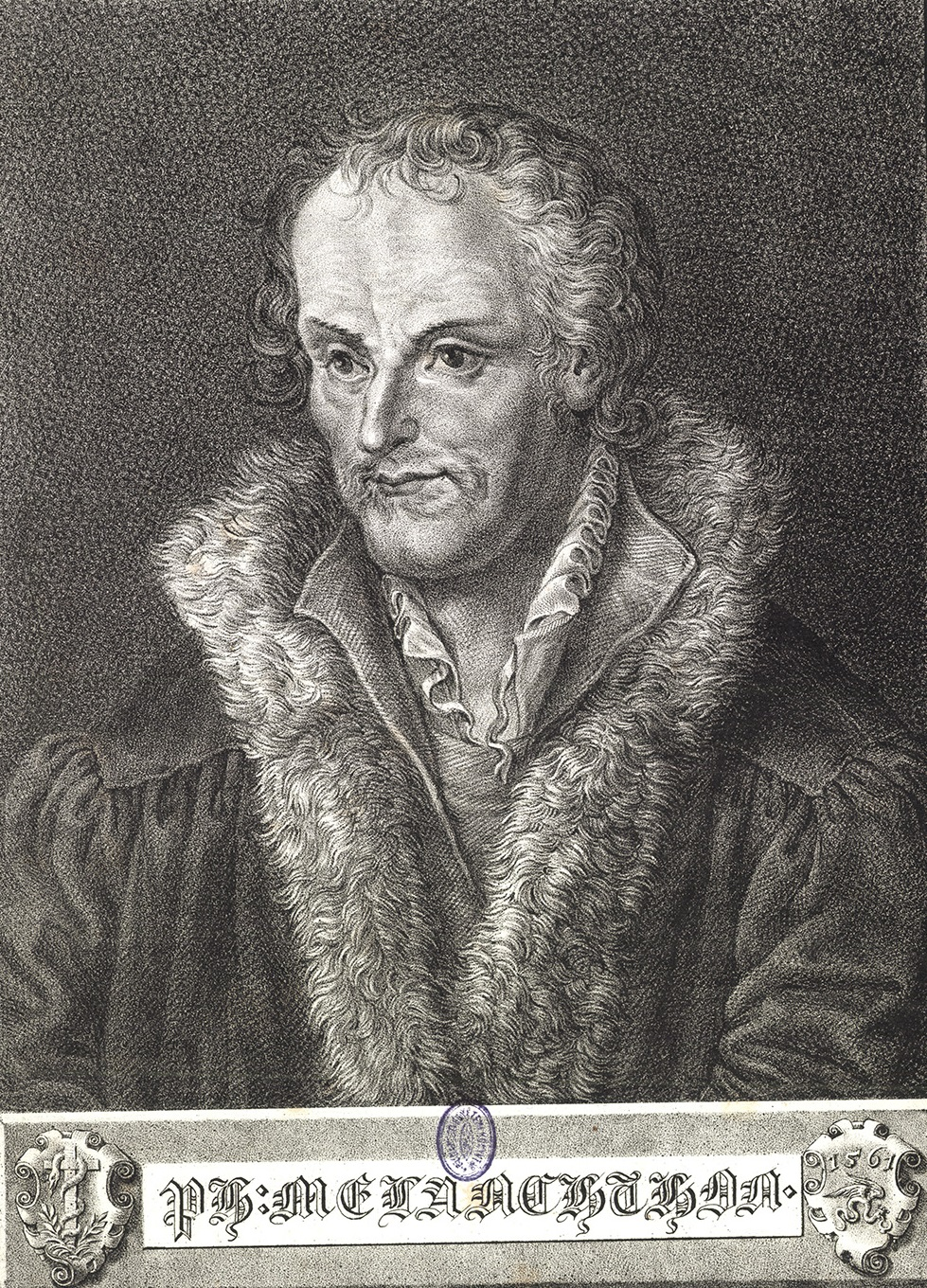 Philipp Melanchthon (eredeti nevén: Philipp Schwartzerdt) (Bretten (Pfalz), 1497. február 16. – Wittenberg, 1560. április 19.) német teológus, reformátor, Luther Márton munkatársa.